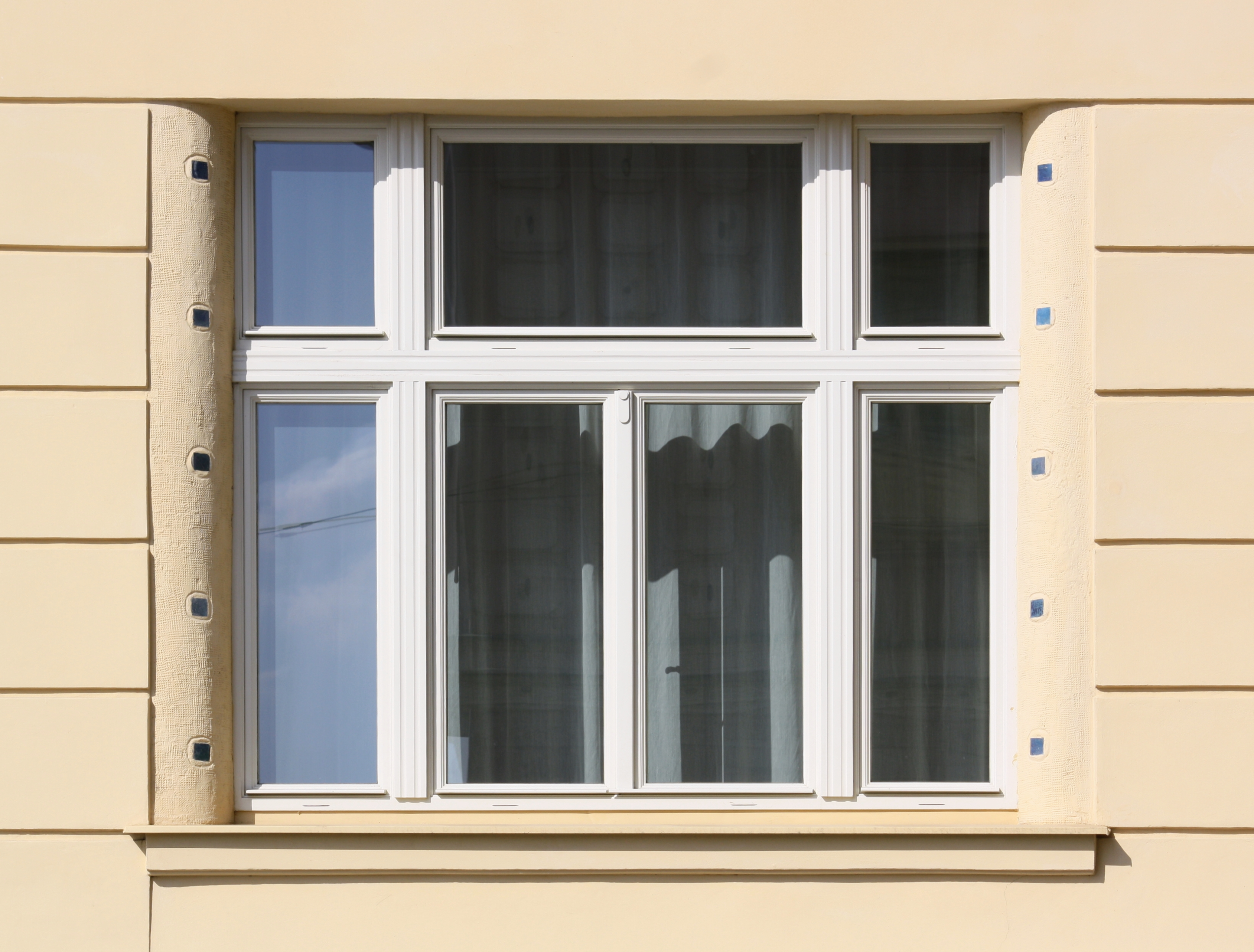 Praha, Nové Město - Trojická 386